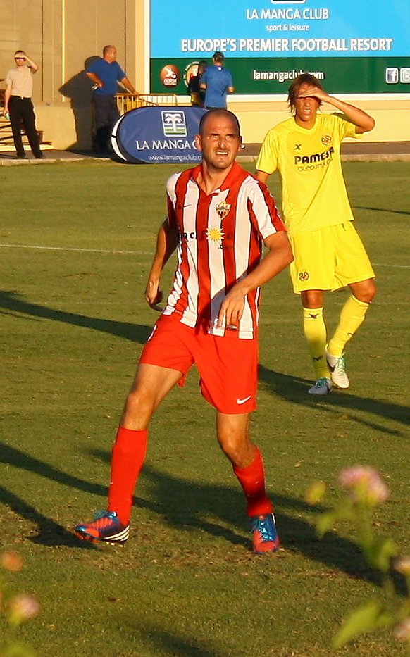 Fotografía de Soriano, jugador de la U.D. Almería